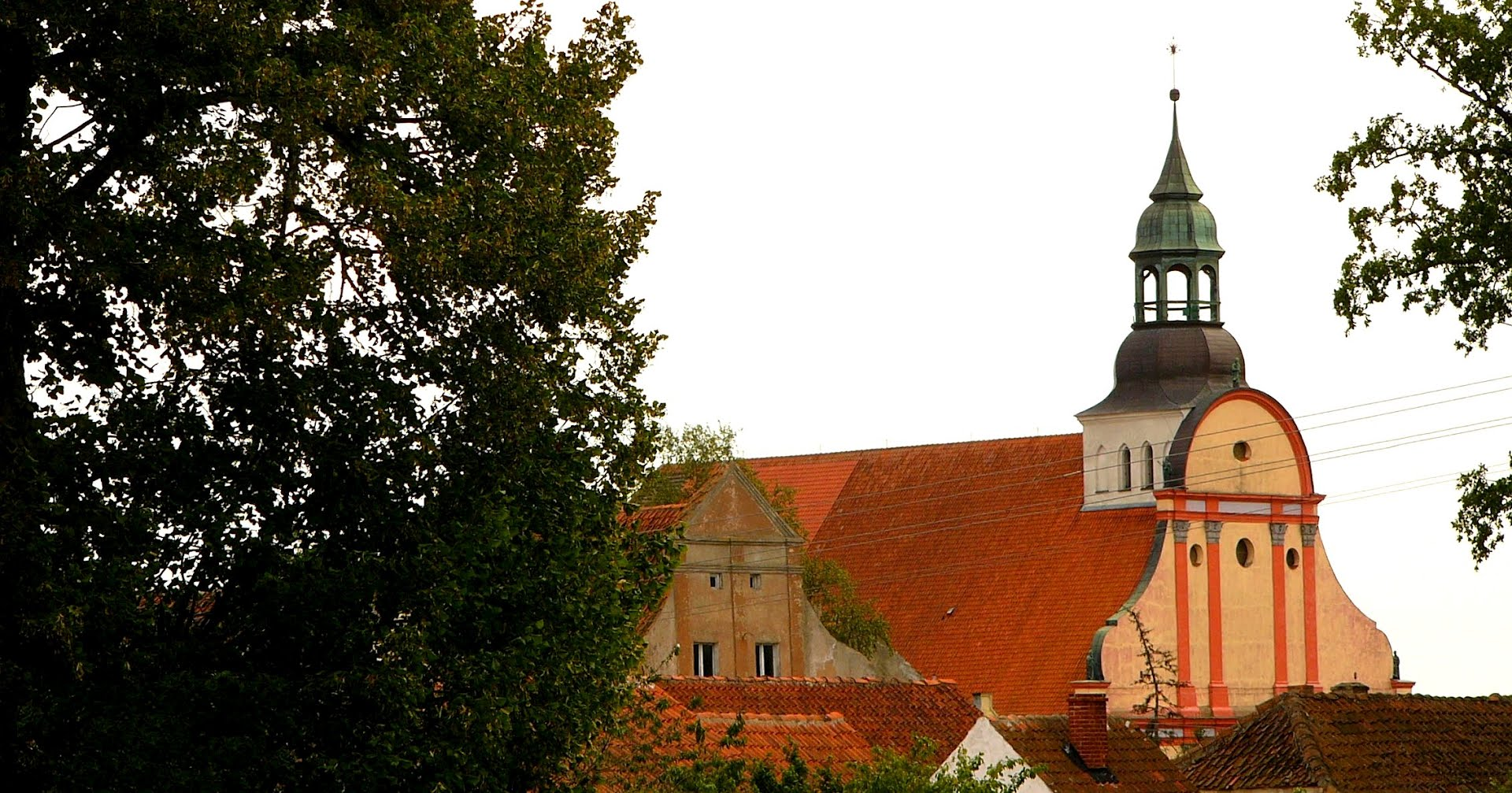 Bisztynek, ul. Kościelna, - dawny kościół farny pw. św. Macieja Apostoła (zabytek nr A-413 z 12.10.1957)